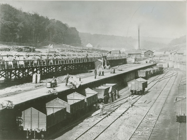 Grube Von der Heydt (Saarbrücken), Eisenbahnhalde